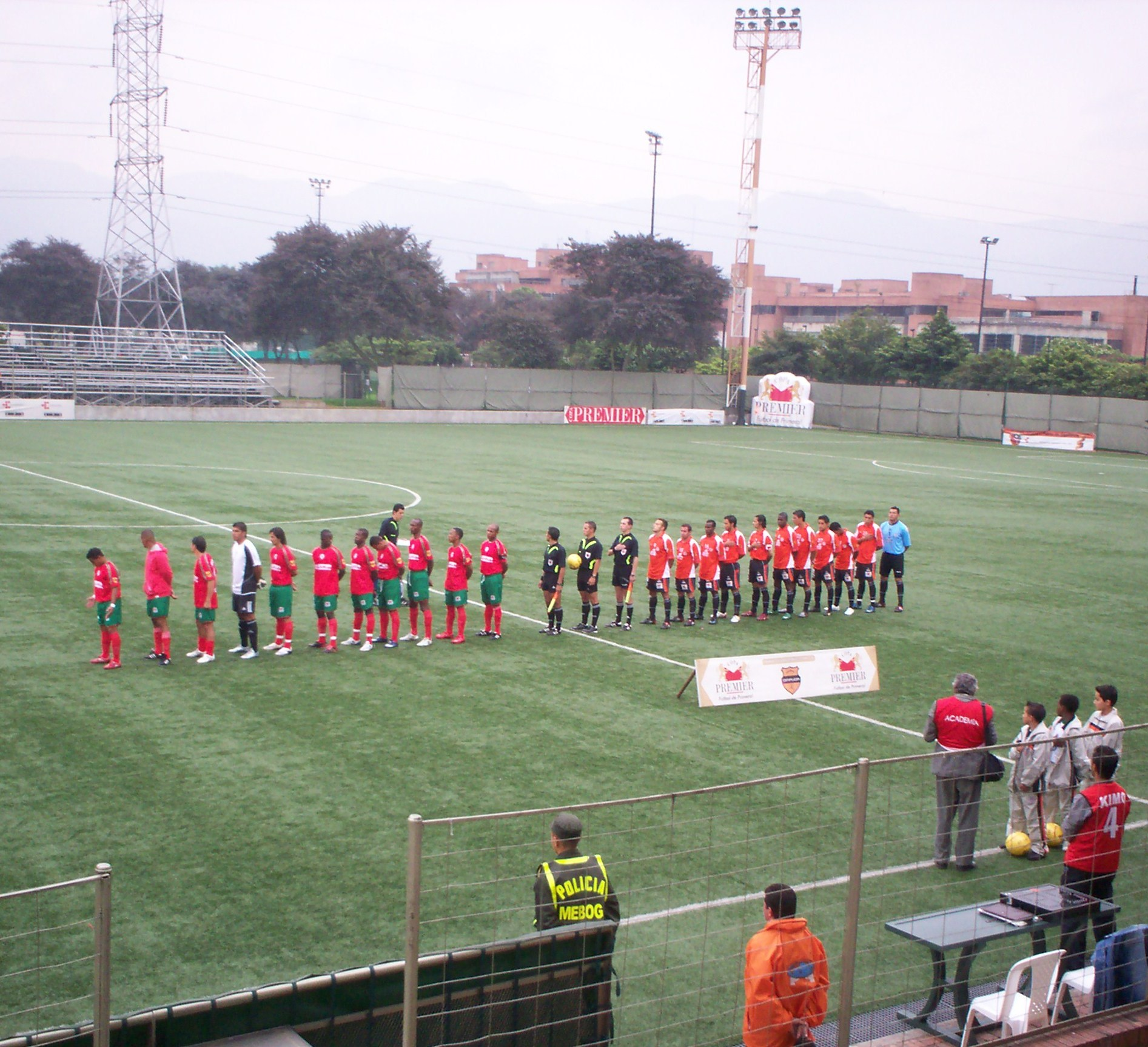 Partido de la Primera B colombiana entre Academia FC y Cortuluá.